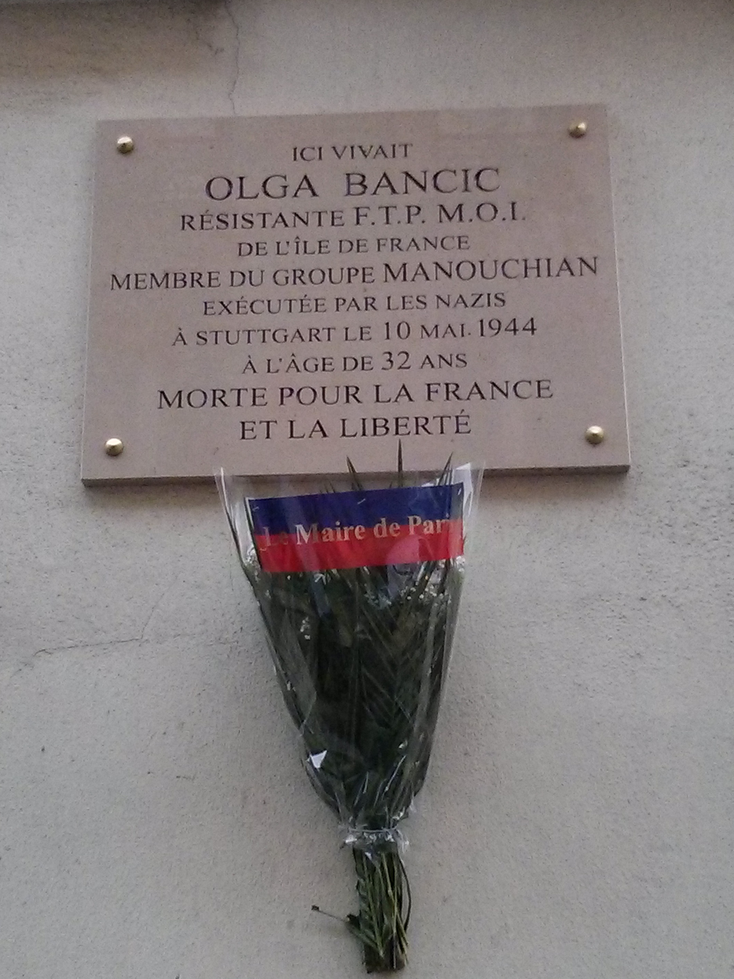 "Ici vivait Olga Bancic résistante FTP MOI de l'Île-de-France membre du groupe Manouchian exécutée par les nazis à Stuttgart le 10 mai 1944 à l'âge de 32 ans. Morte pour la France et la liberté."